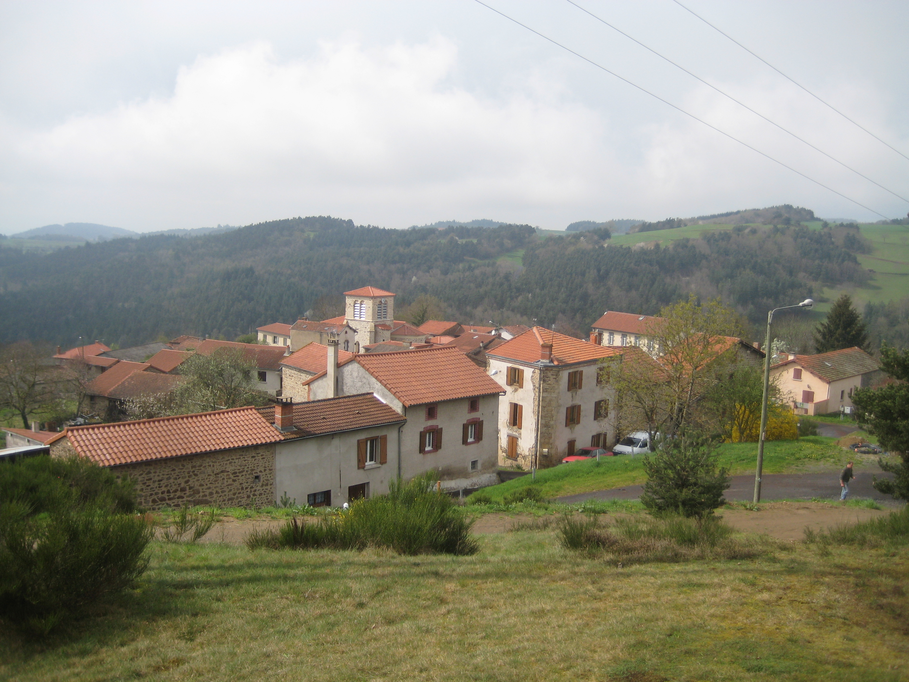 vue du village d'Agnat